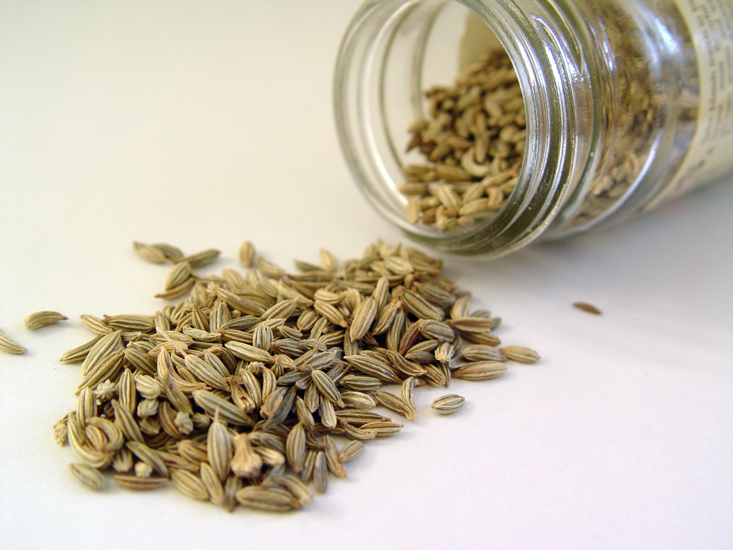 Fennel seed